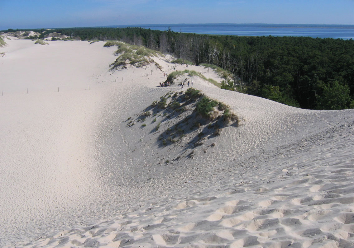 Słowiński Park Narodowy - wydmy